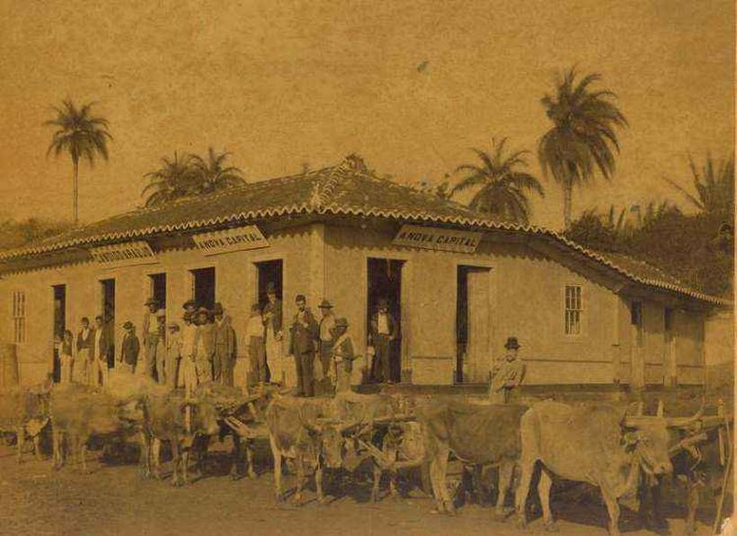 O arraial de Curral del Rei.